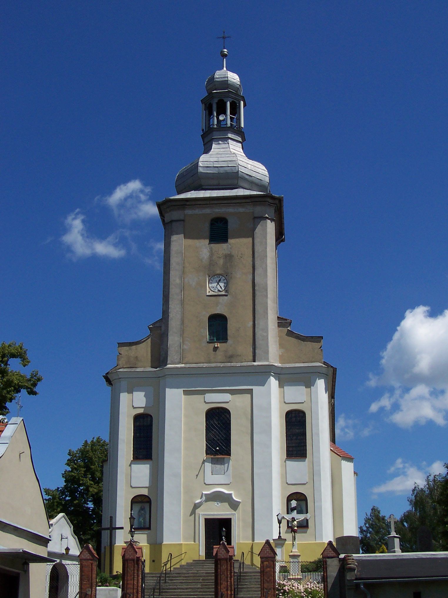 Kościół w Łubiu